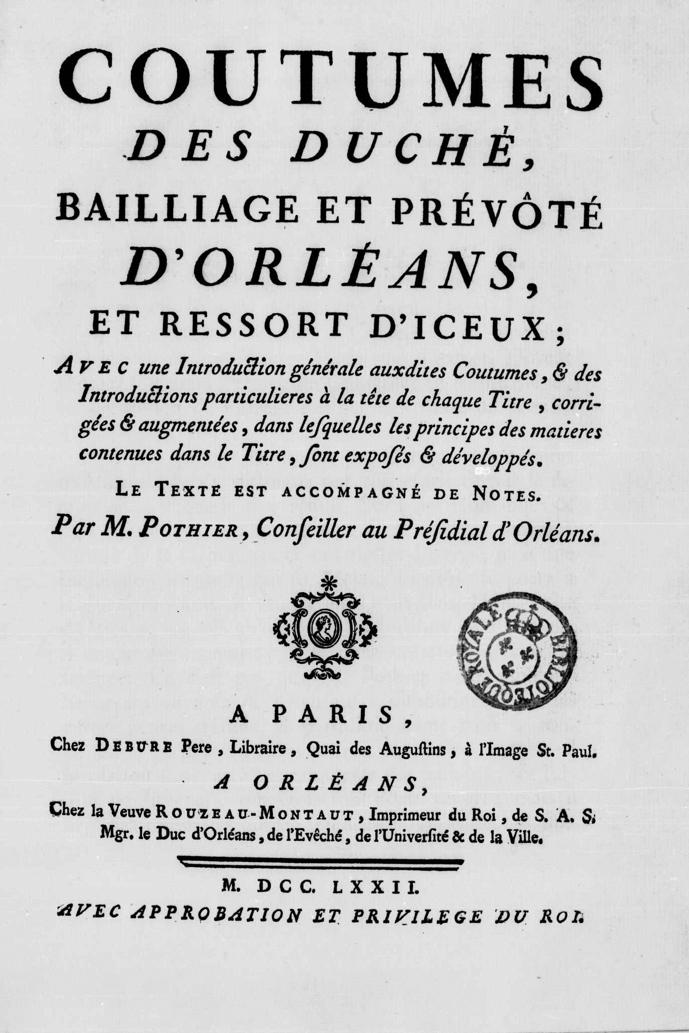 Frontespizio